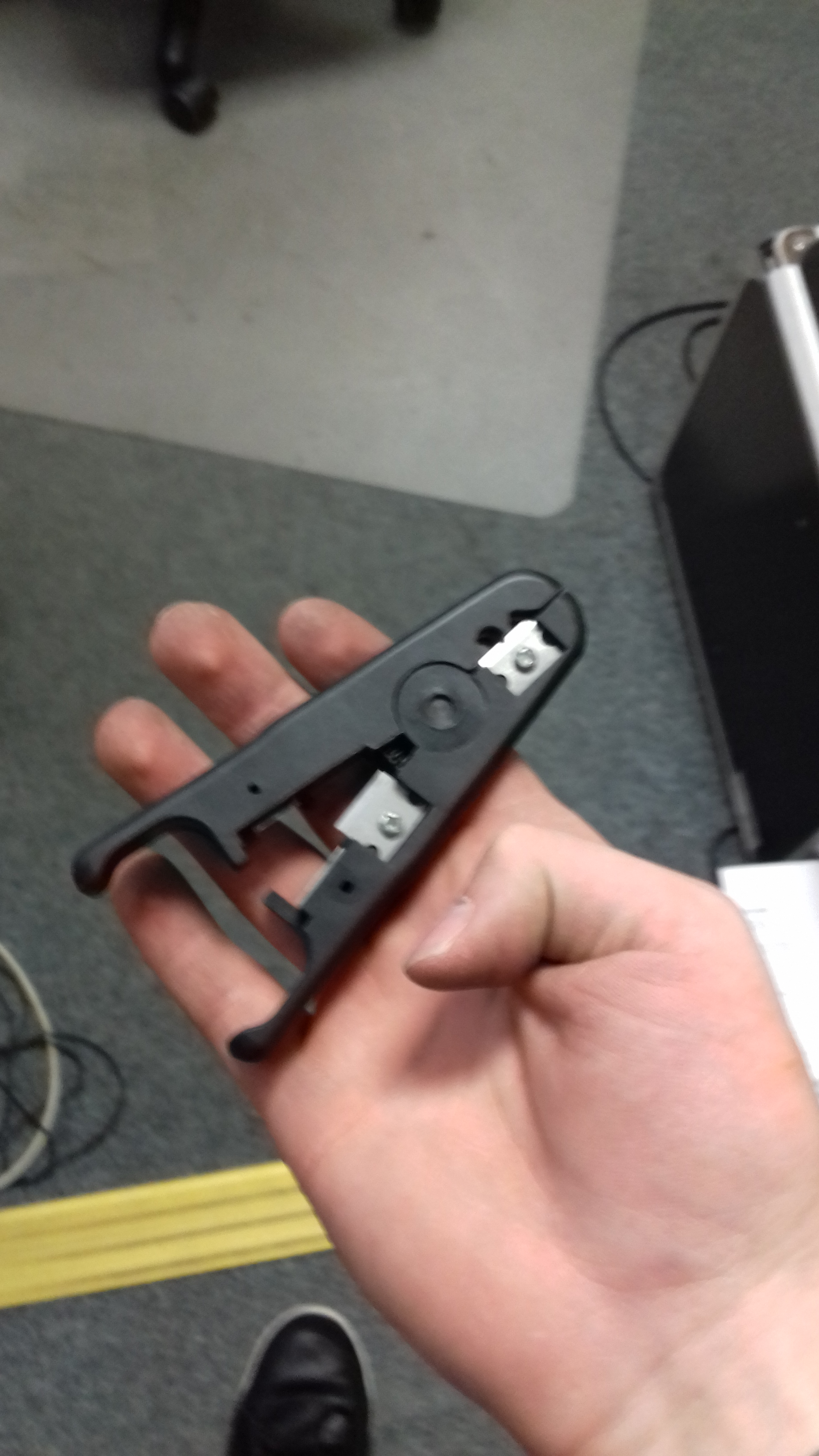 Stripovač vypadá takto...